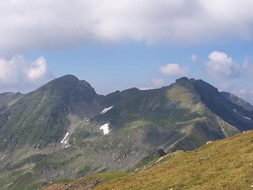 Ciortea